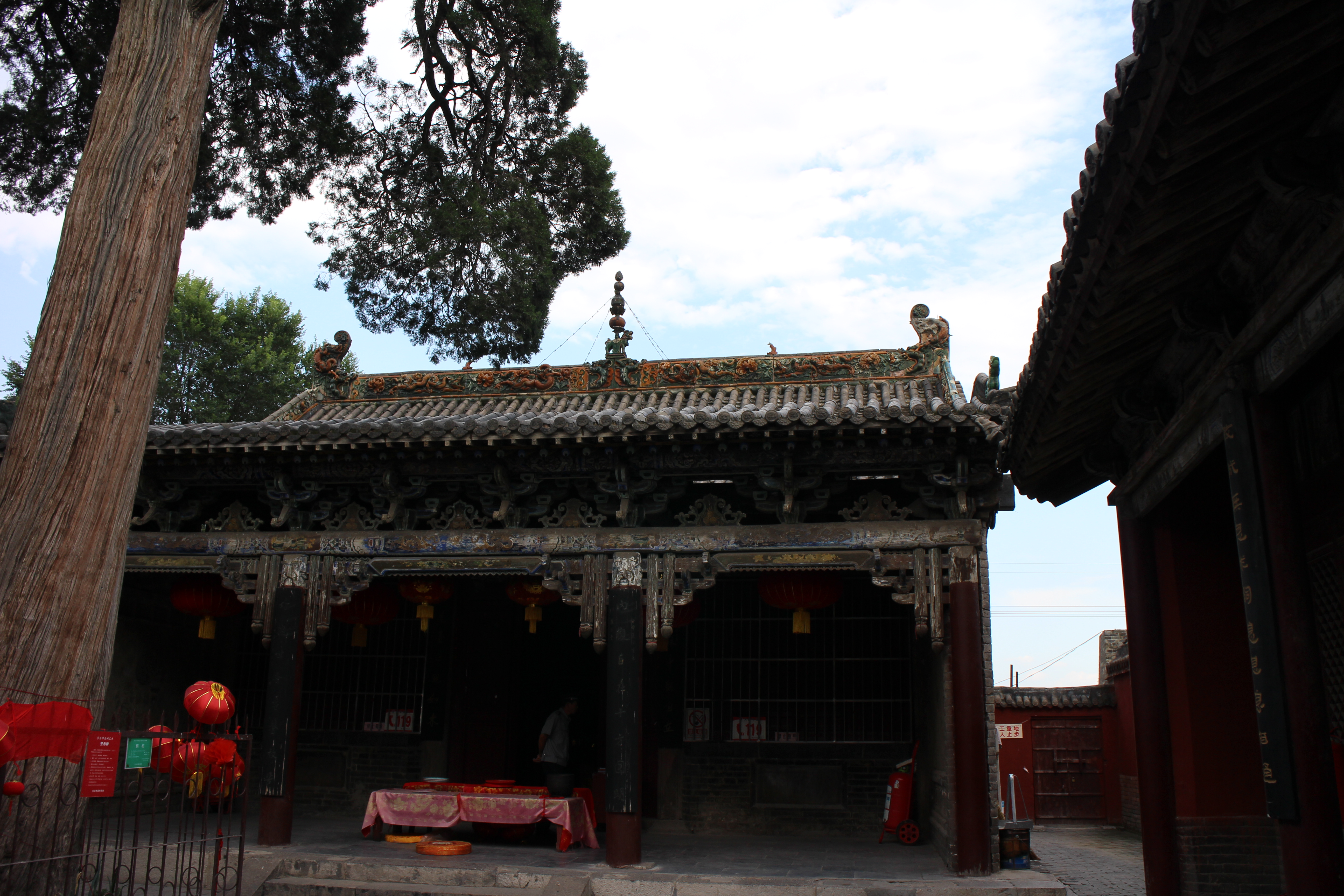 长治观音堂